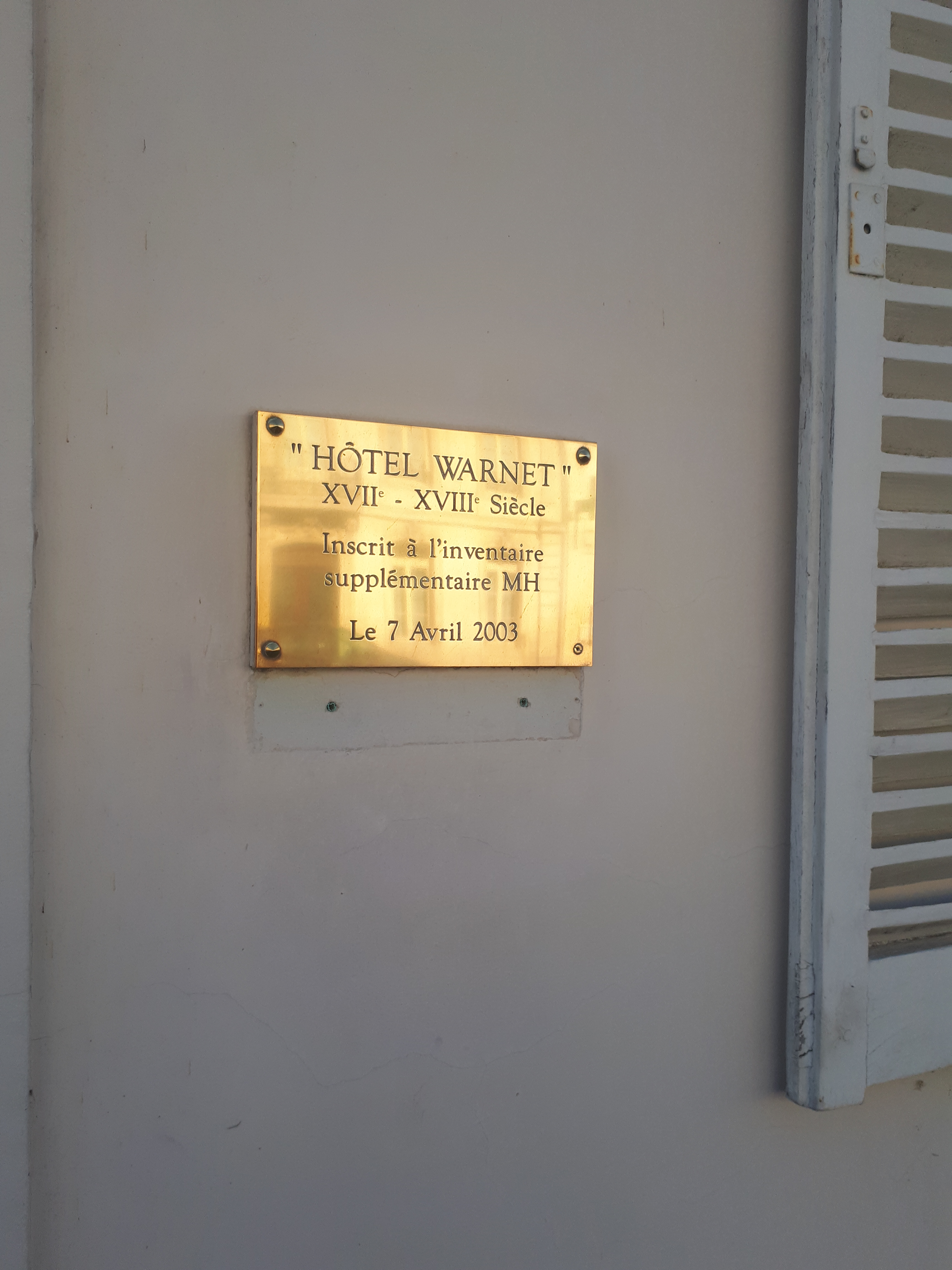 Hôtel Warnet (plaque)